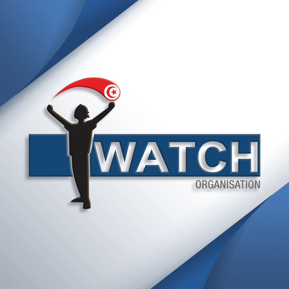 Logo I WATCH